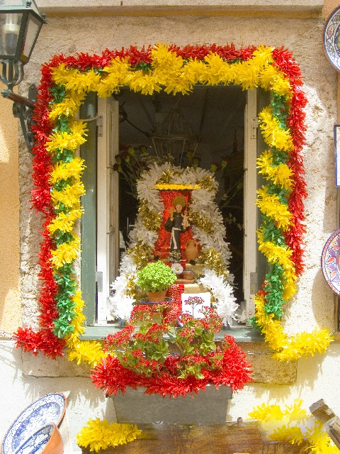 Wikipedia: Lisbona